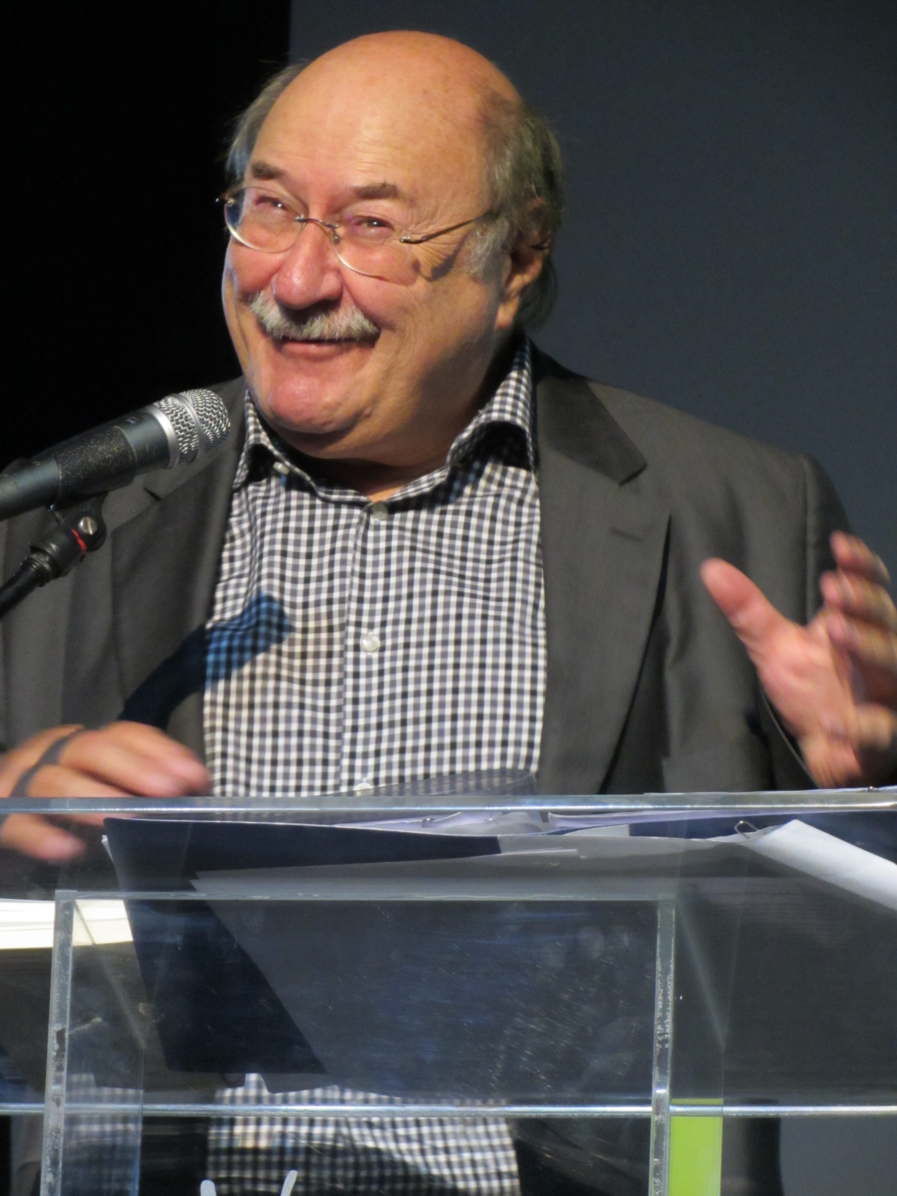 El escritor chileno Antonio Skármeta en la inauguración de la primera Feria del Libro de Vitacura; Casas de Lo Matta, 22 de abril de 2015